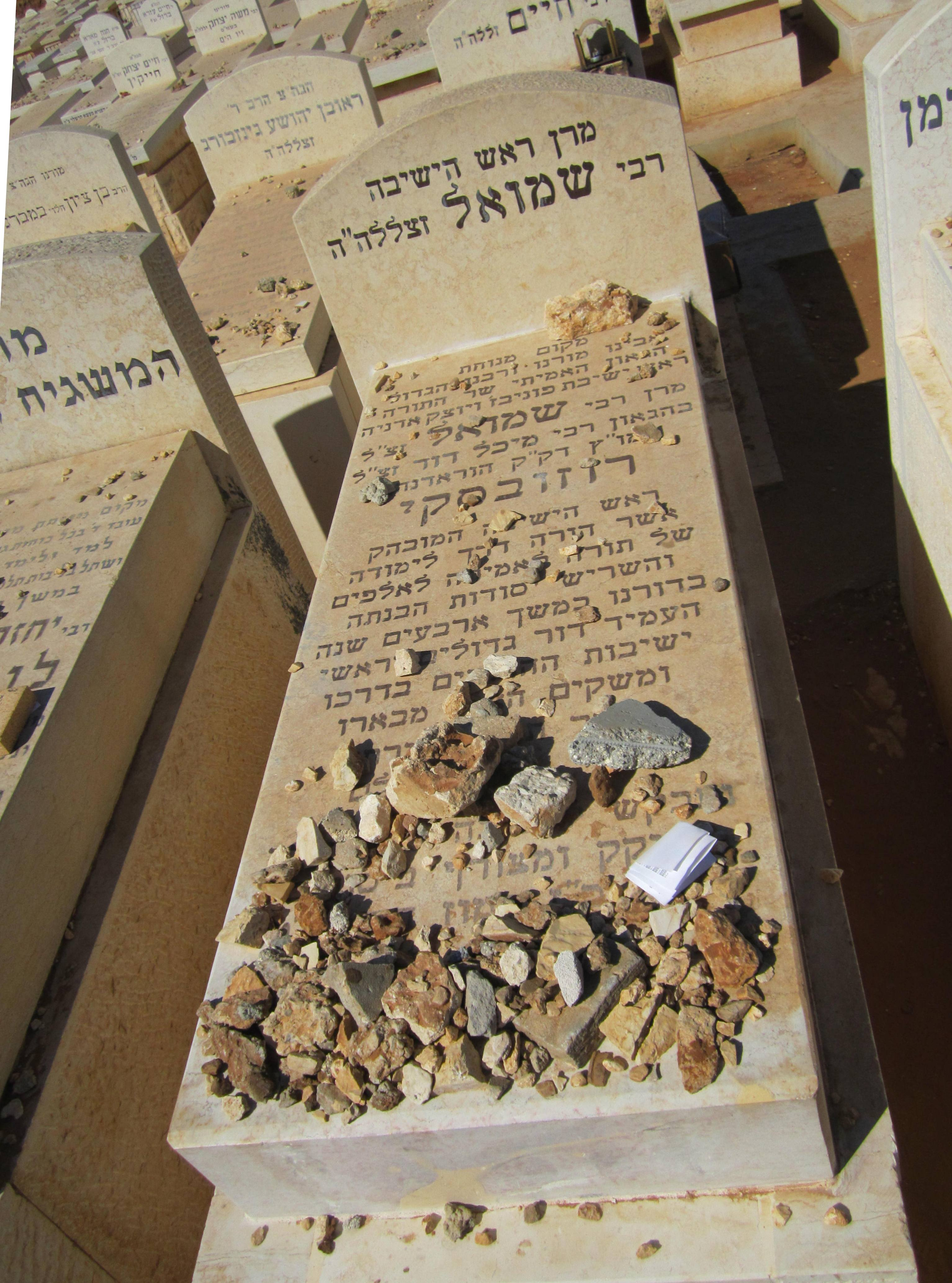 מצבת הרב שמואל רוזובסקי